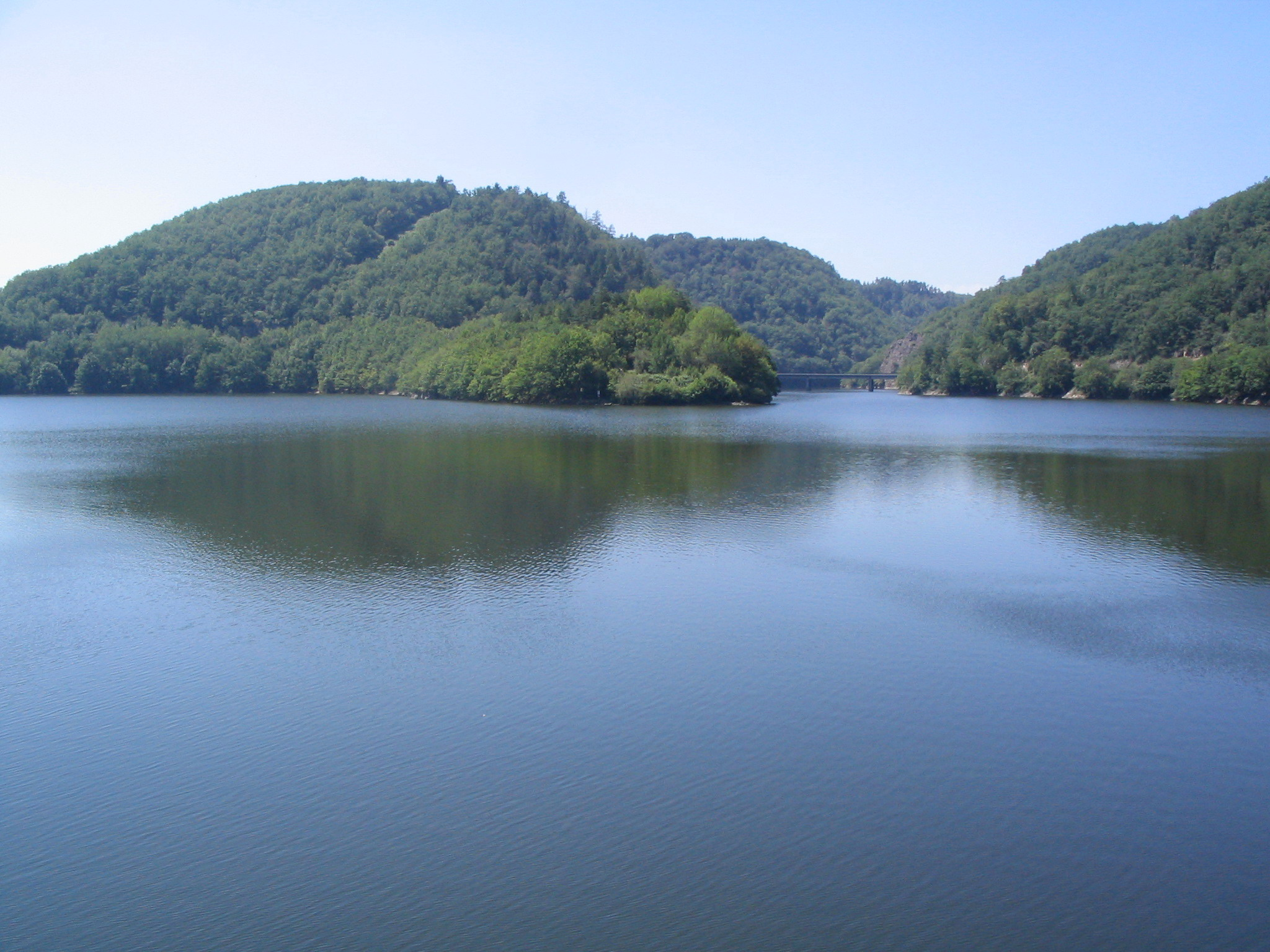 Barrage de Besserves, en Auvergne.